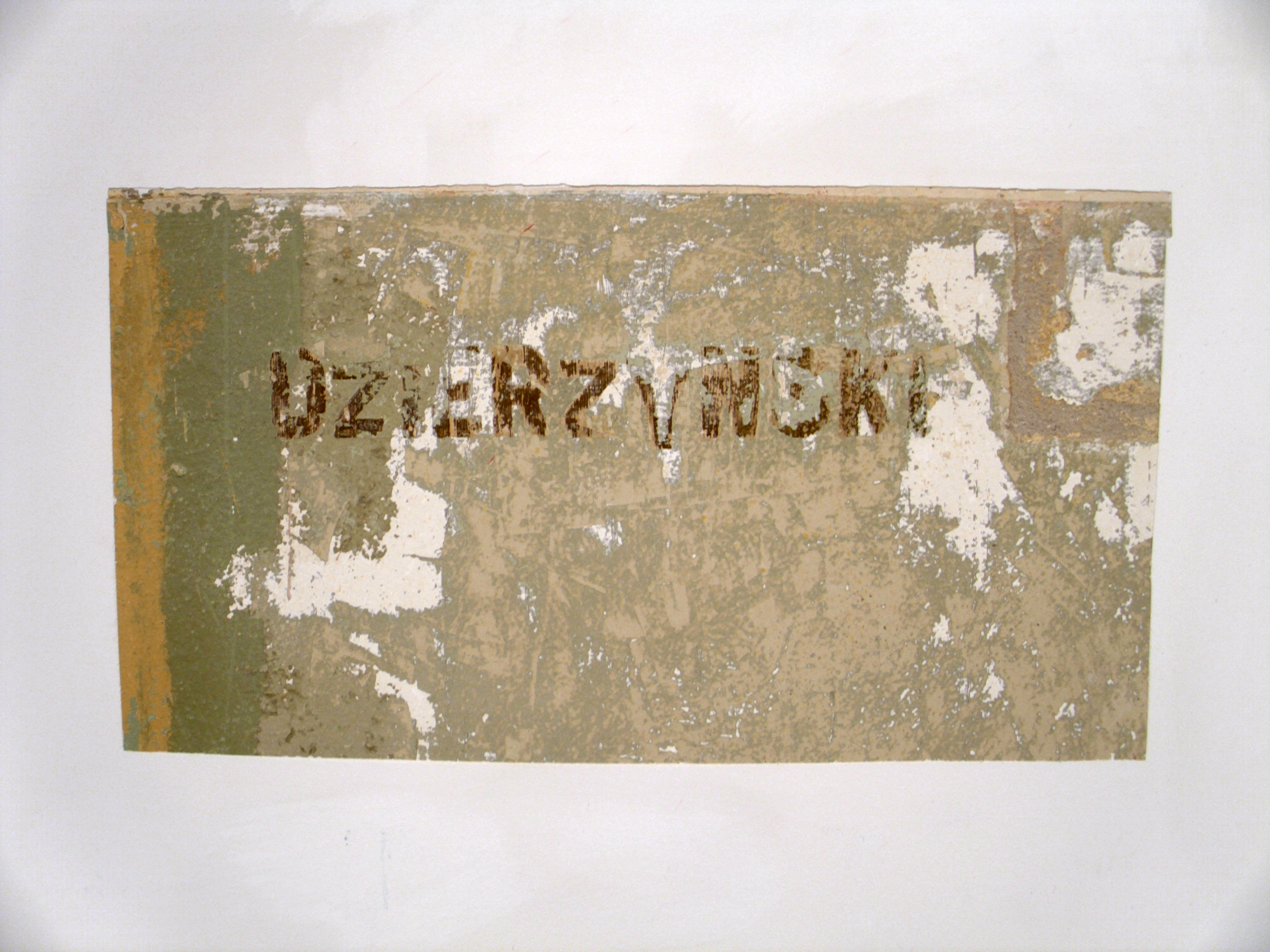 Dzierzynski-Schriftzug an der Wand des Stabsgebäude 1.